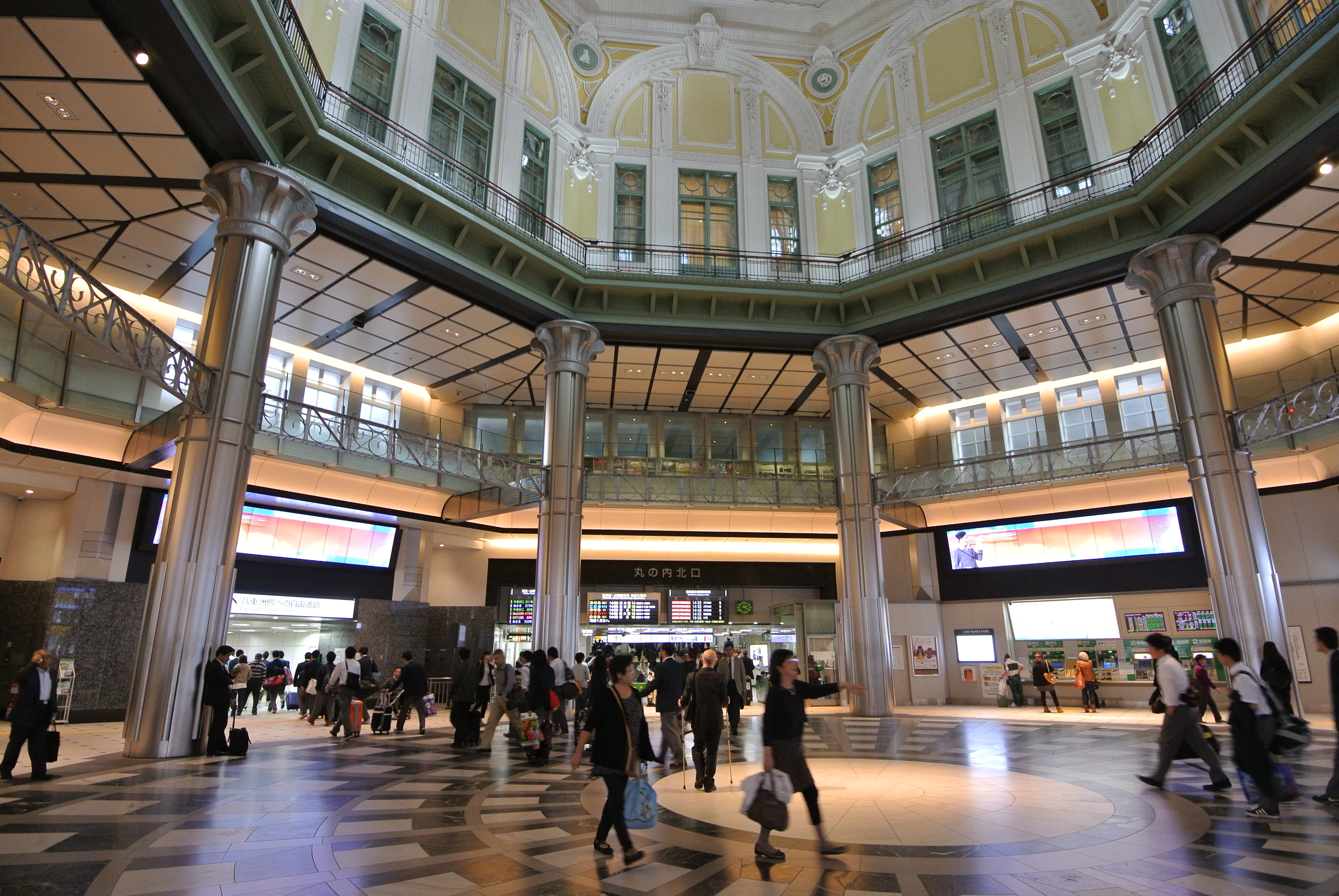 東京駅構内